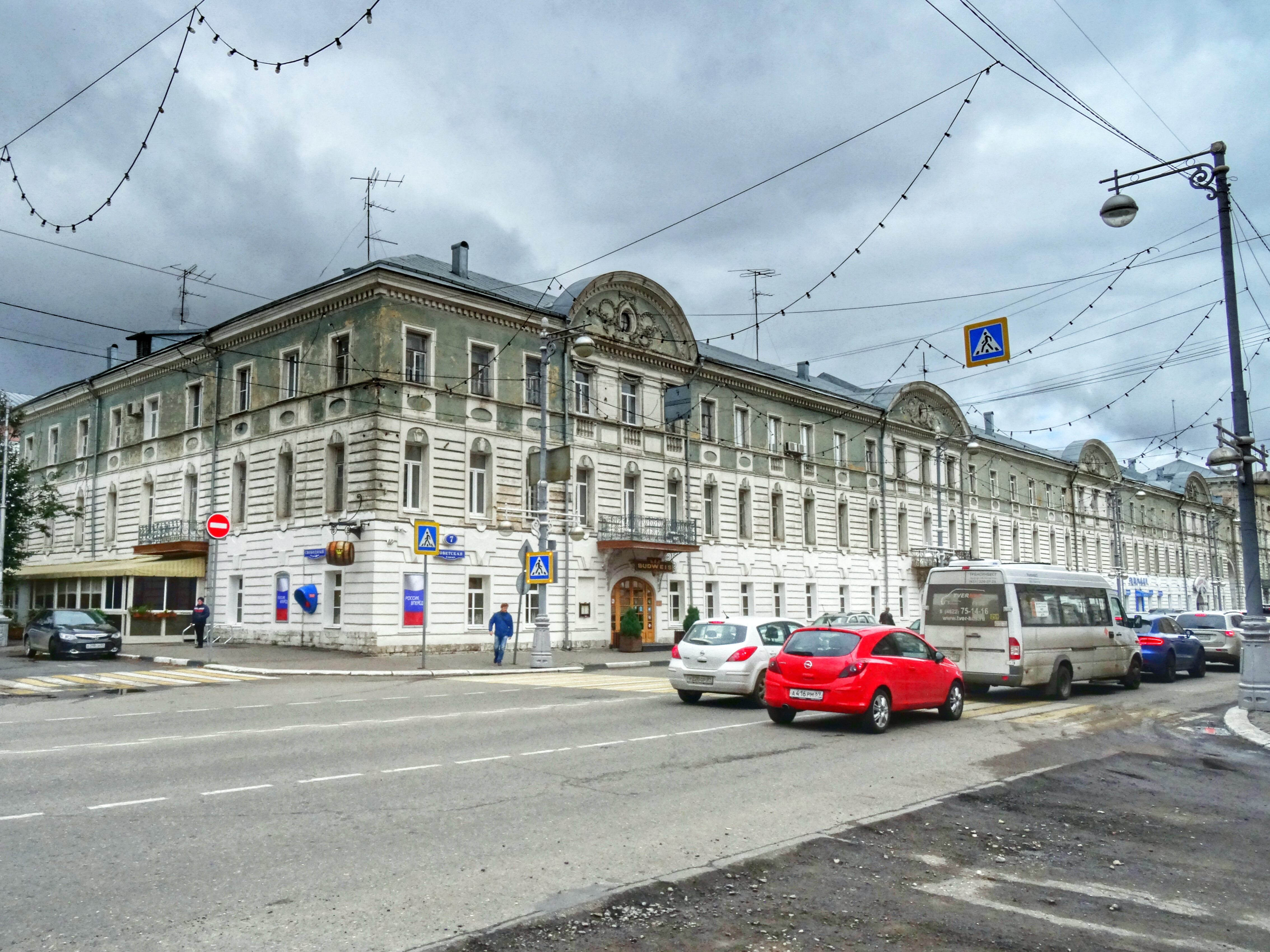 Дом жилой: улица Советская, 7, Тверь, Тверская область